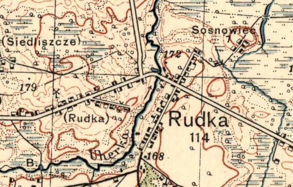 Pagus Rudka (Polonia, districtus chelmensis), 1933